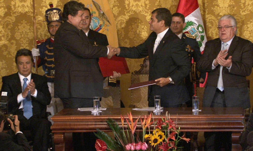 Palacio de Gobierno, Quito-Ecuador 20 de mayo de 2011